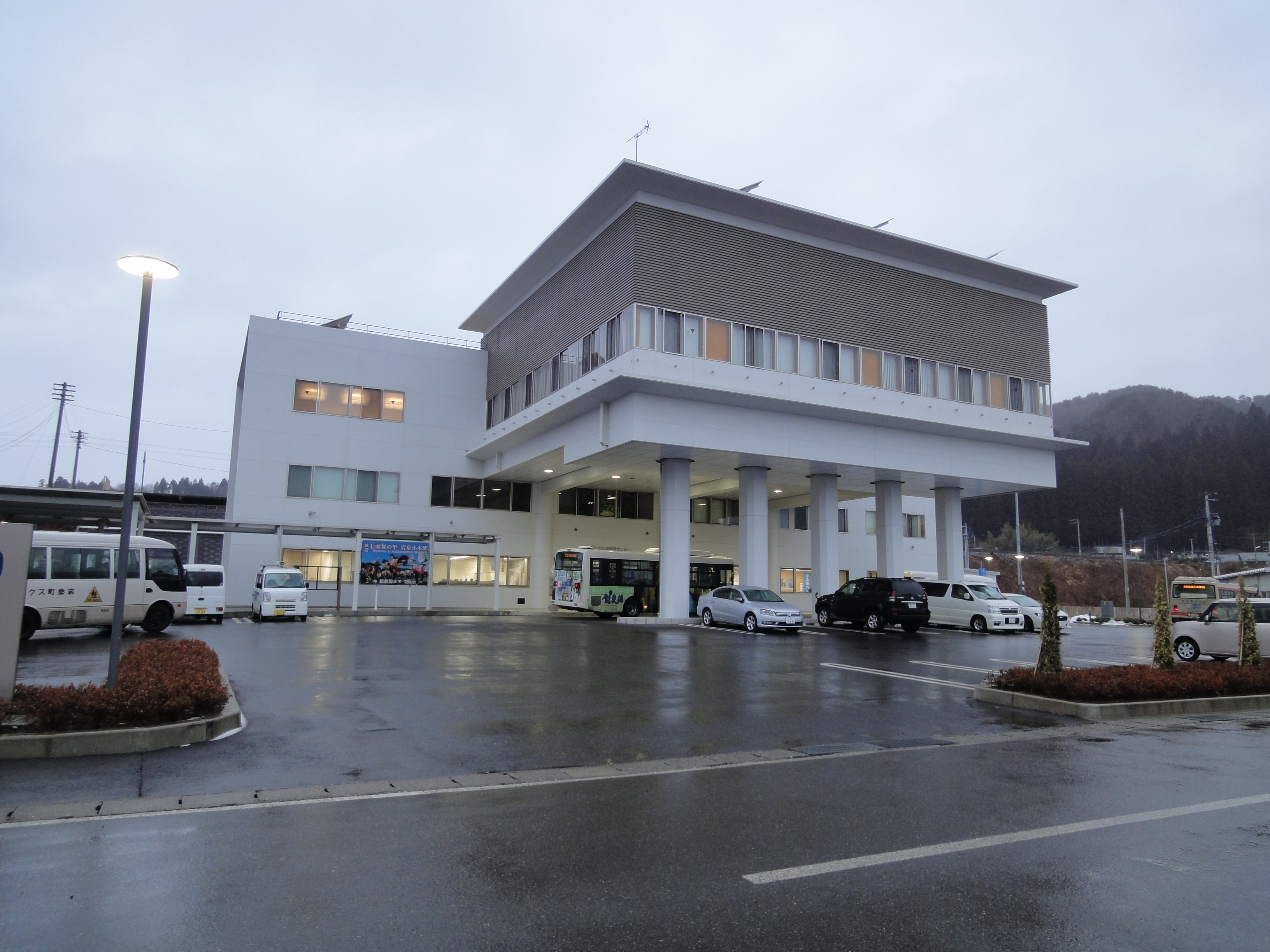 iwate_20180308170214